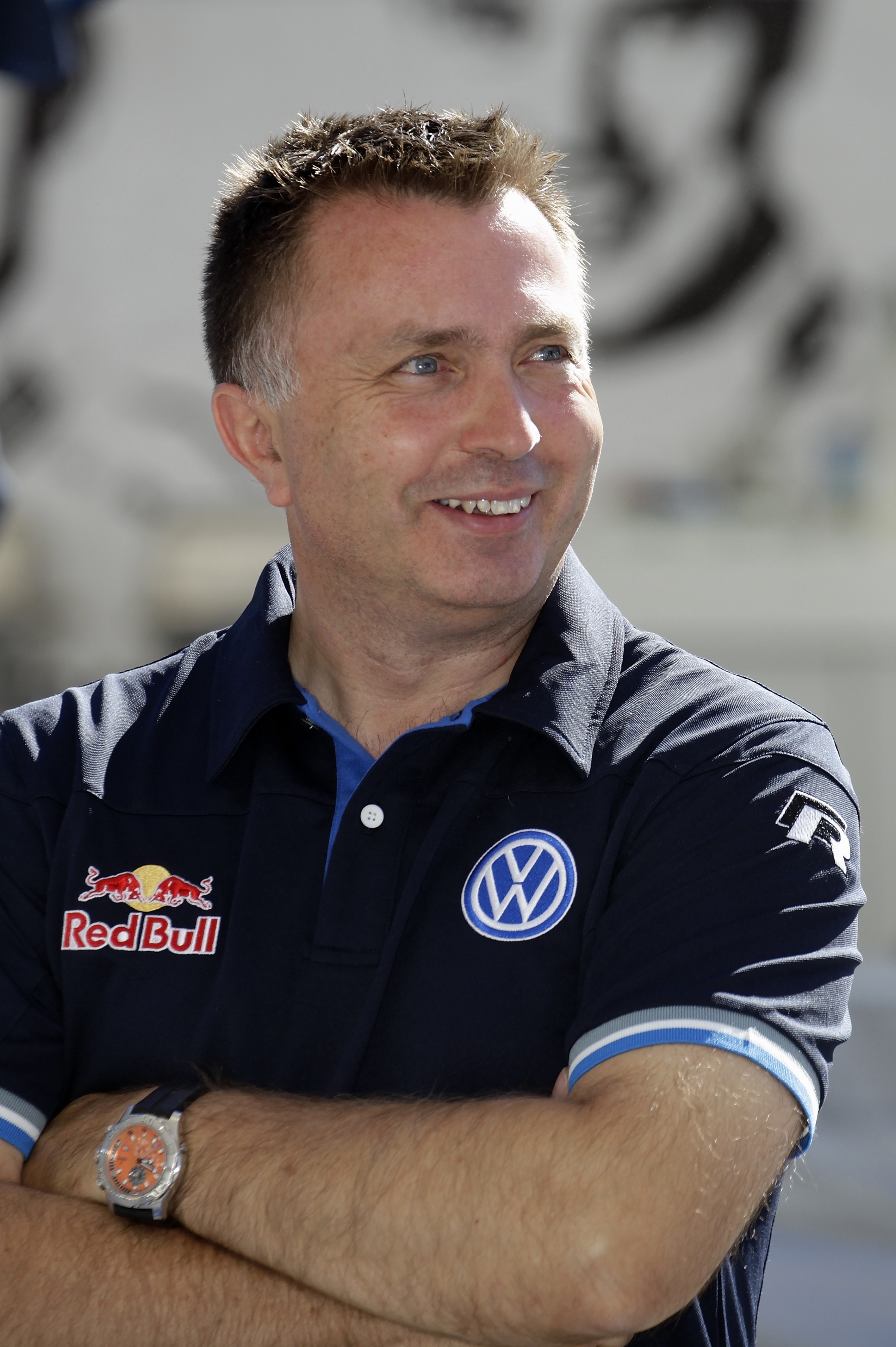 Jost Capito während der WRC Rally Australia 2013